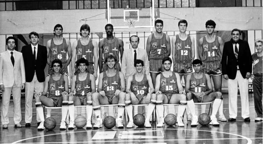 Equipo de Ferro (BA) campeón de la LNB en 1986